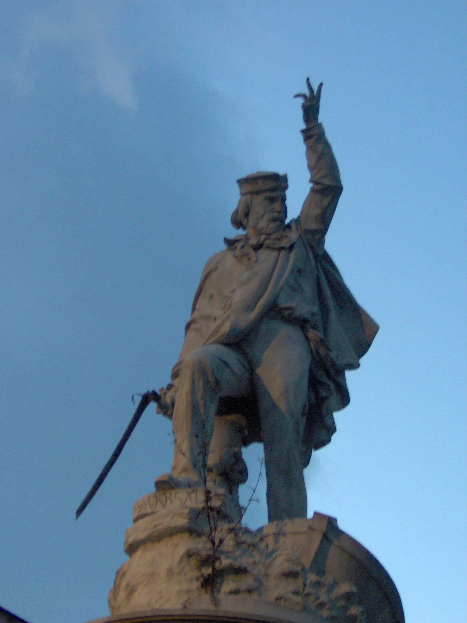 Statua dedica a Garibaldi a Carrara